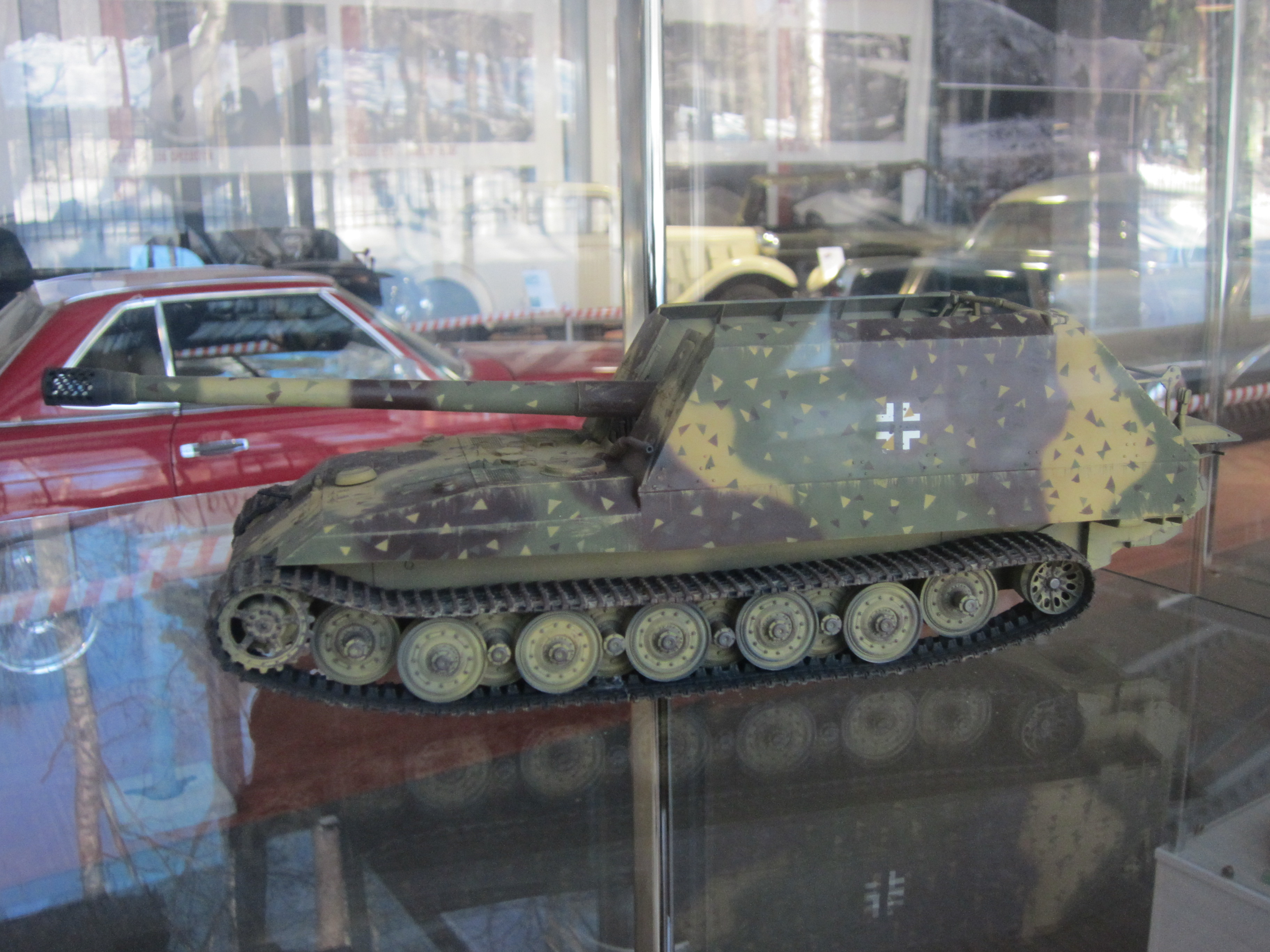 Модель САУ Geschutzwagen Tiger в масштабе 1-:35. Экспонат выставки моделей в Зеленогорском музее ретро-автомобилей